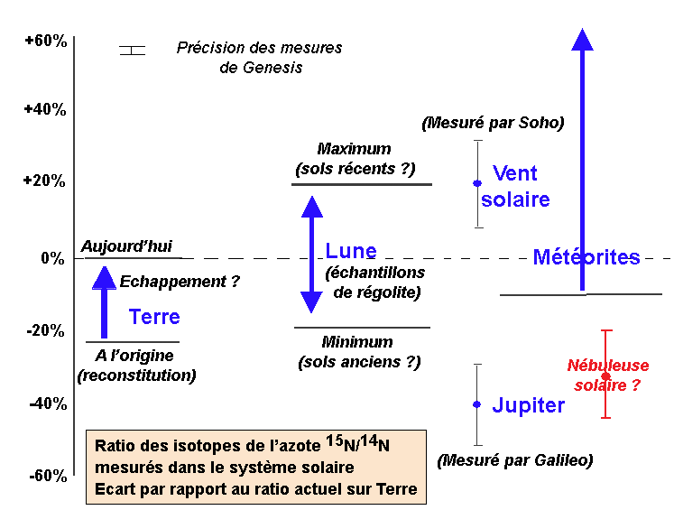 Ratio des isotopes de l’azote 15N/14N (en bleu) mesurés en différents endroits du système solaire Ecart par rapport au ratio actuel sur Terre. Les mesures effectuées par les sondes spatiales SoHO et Galileo présentent une incertitude précisée par les barres inférieure et supérieure. Le ratio de la Terre à l'origine est déduit du ratio des isotopes de néon et supposé lié à un processus d'échappement atmosphérique. Les valeurs hétérogènes pour les météorites et le régolite lunaire résultent des mesures directes effectuées sur des échantillons..